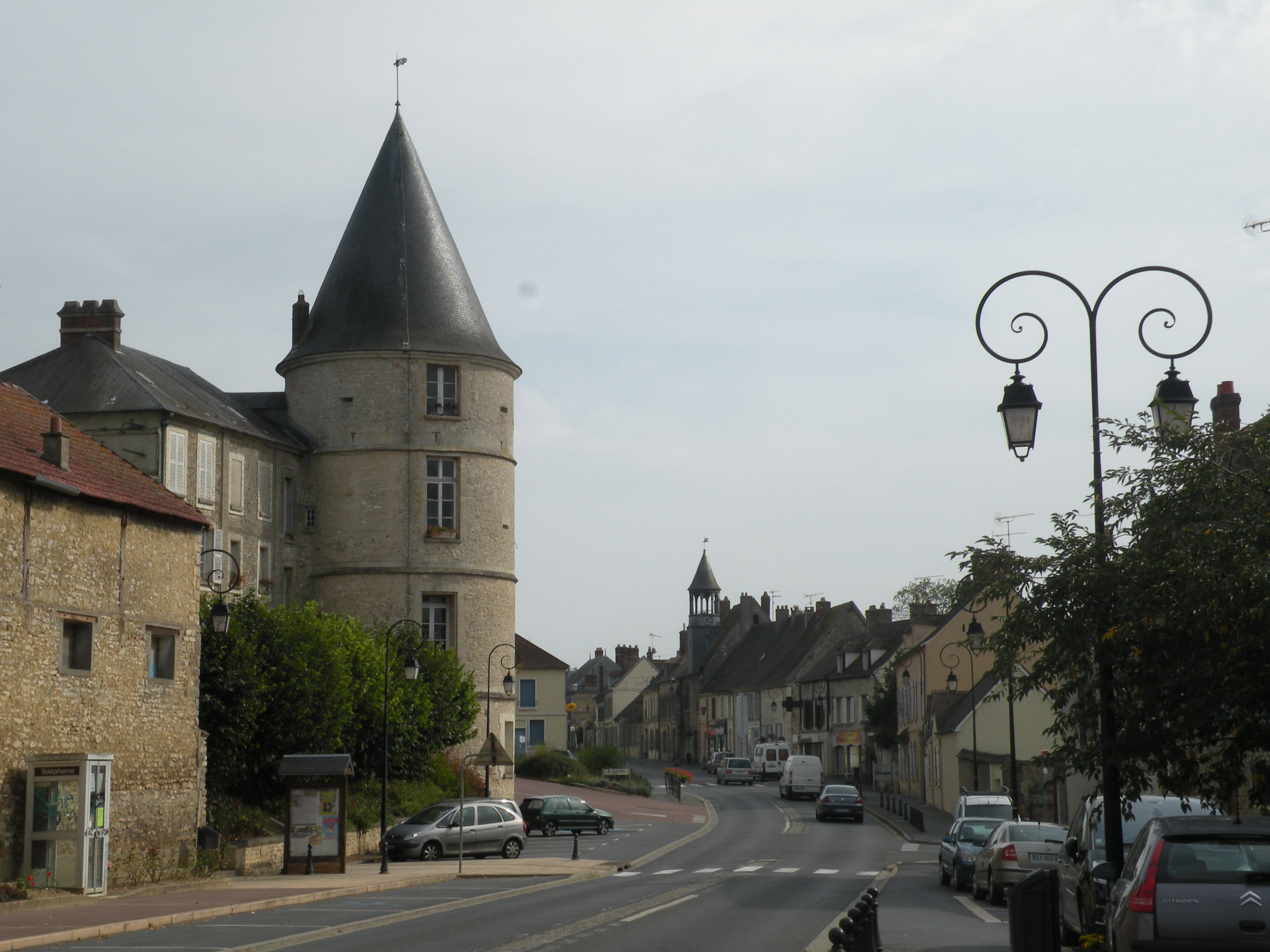 détail mairie de Trie-Château